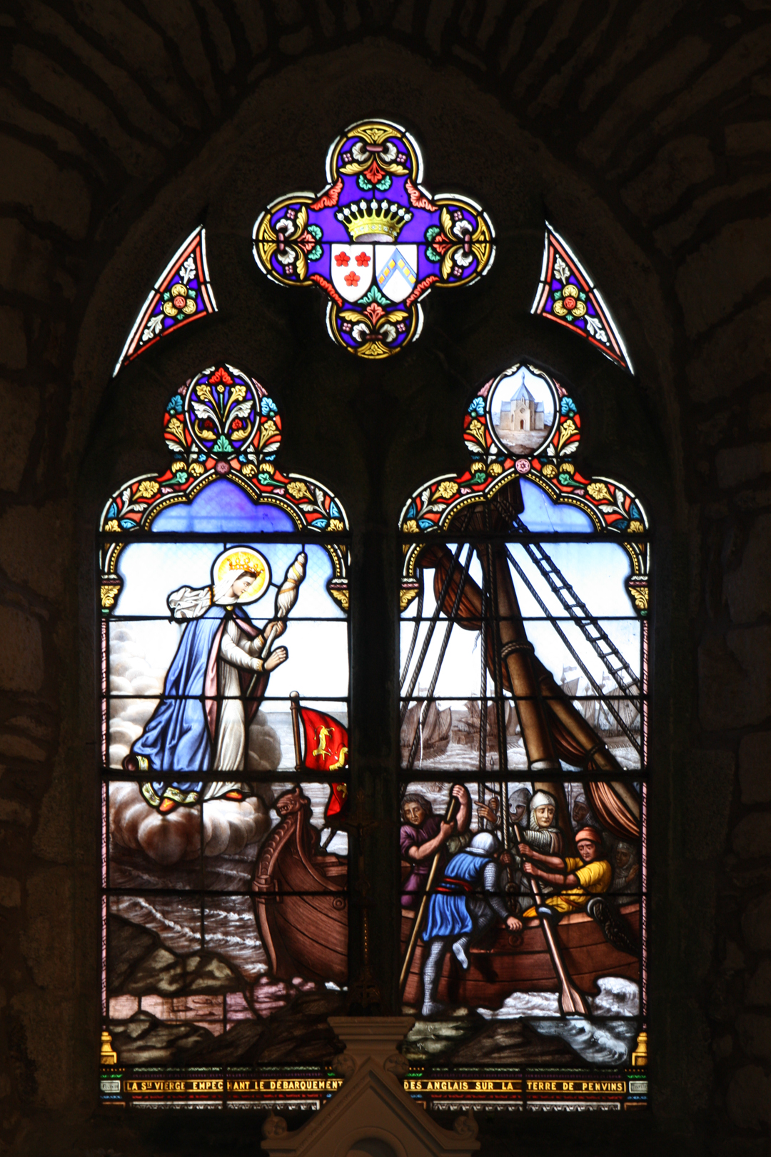 Vitrail de la vierge de la chapelle Notre-Dame-de-la-Côte à Penvins (Sarzeau - Bretagne).